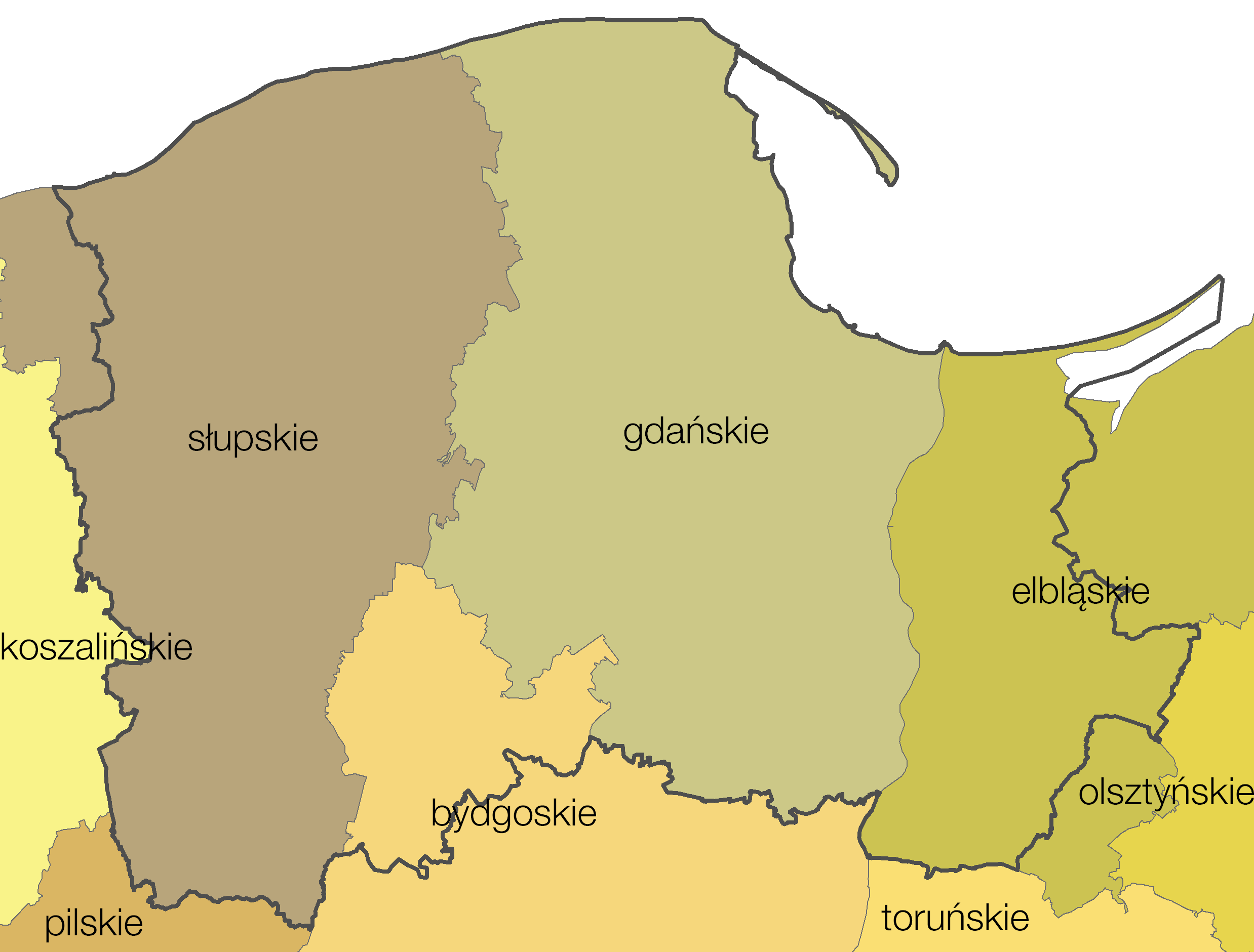 Województwo pomorskie (od 1999) jako powstałe z województw podziału administracyjnego Polski z lat 1975-1998